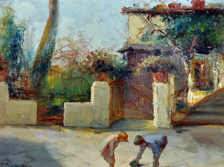 Giochi di bambini, olio su tavola, cm 25 x 34, firmato, coll. privata